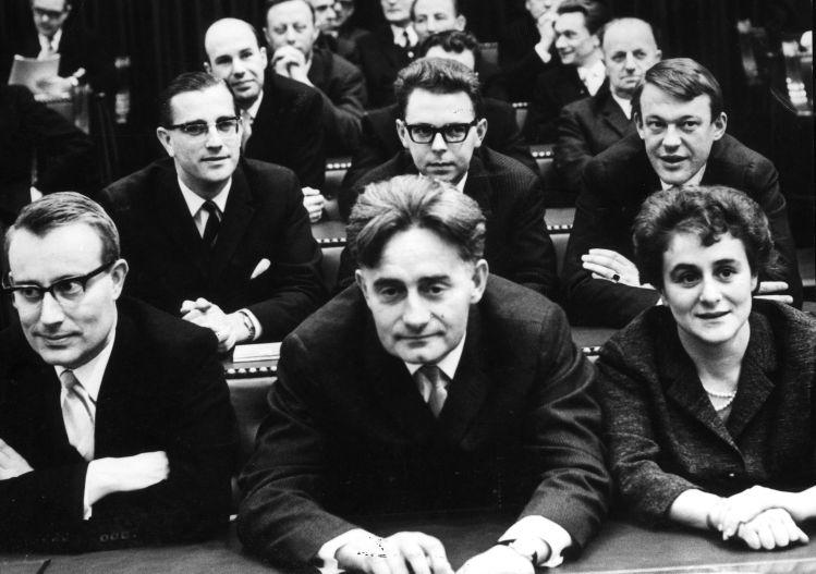 Nationaal Archief / Spaarnestad Photo / Anefo, SFA001008872 D66 voor het eerst in de Tweede Kamer 23-2-1967 Rij 1: Minne Dijkstra, Sef Imkamp, Anneke Goudsmit Rij 2: Aar de Goede, Erik Visser, Hans van Mierlo Rij 3: Erwin Nypels (links) Collectie Spaarnestad Voor meer informatie en voor meer foto’s uit de collectie van Spaarnestad Photo, bezoek onze Beeldbank: U kunt ons helpen onze kennis van de fotocollecties te verrijken door tags en commentaren toe te voegen. Herkent u mensen of locaties of heeft u een bijzonder verhaal te vertellen bij één van de foto’s, laat dan een reactie achter (als u ingelogd bent bij Flickr) of stuur een mailtje naar: You can help us gain more knowledge on the content of our collection by simply adding a comment with information. If you do not wish to log in, you can write an e-mail to